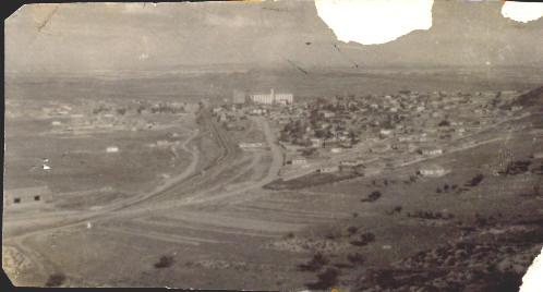 YENİFAKILI